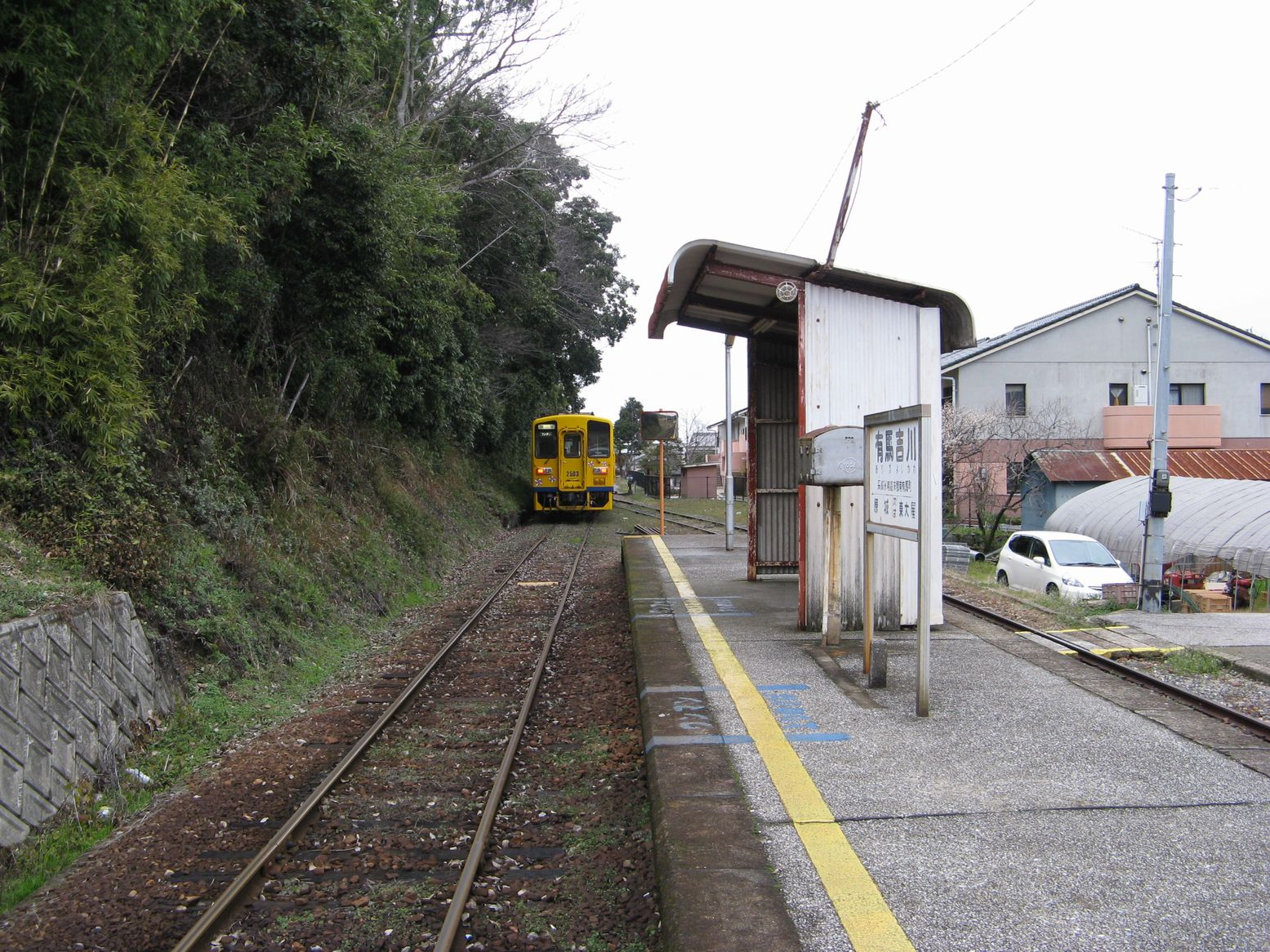 島原鉄道 有馬吉川駅ホーム